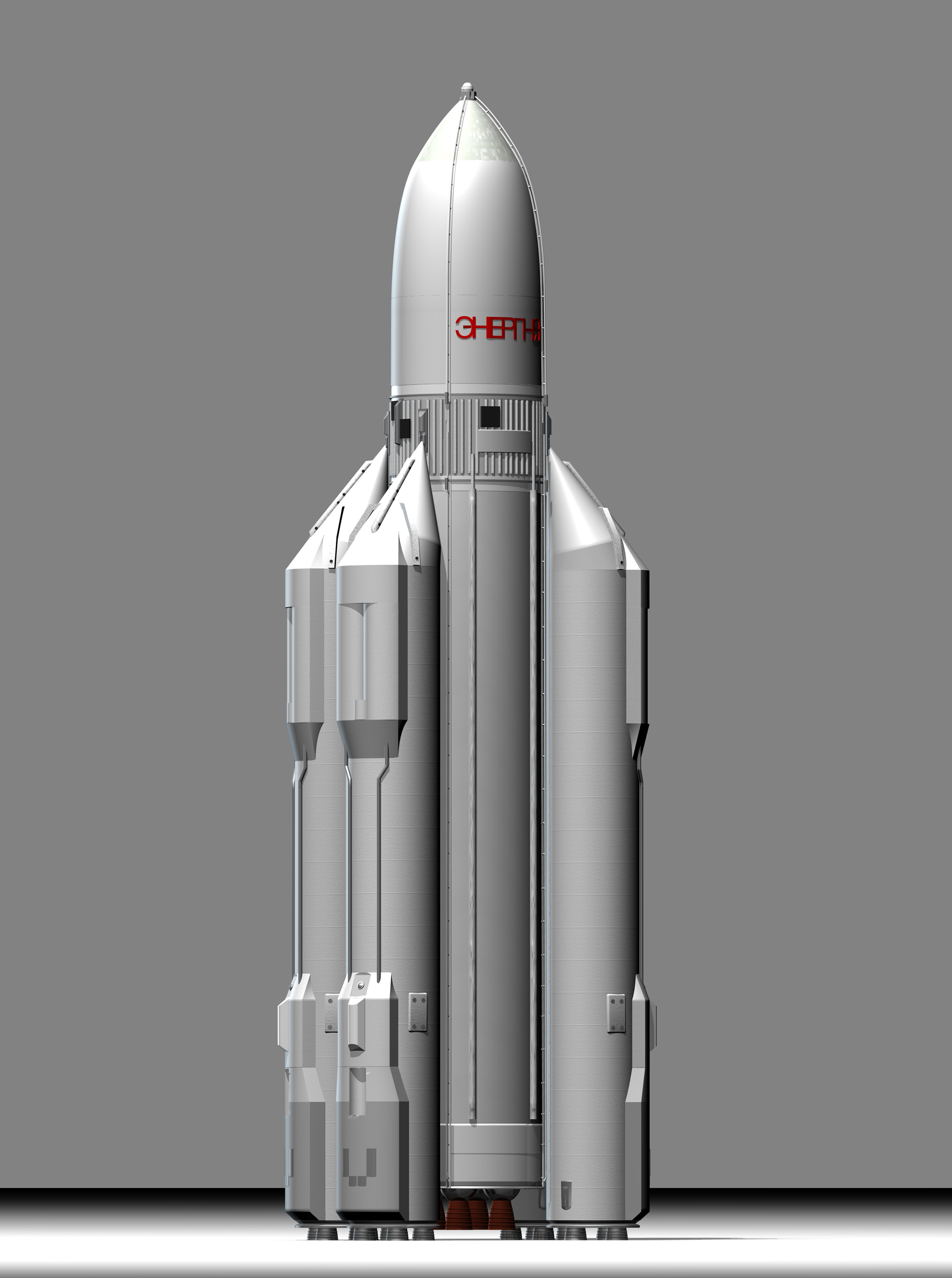 Trägersystem ENERGIJA